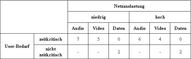 EDCF-User-Prioritätenliste in Abhängigkeit vom Userbedarf und Netzauslastung